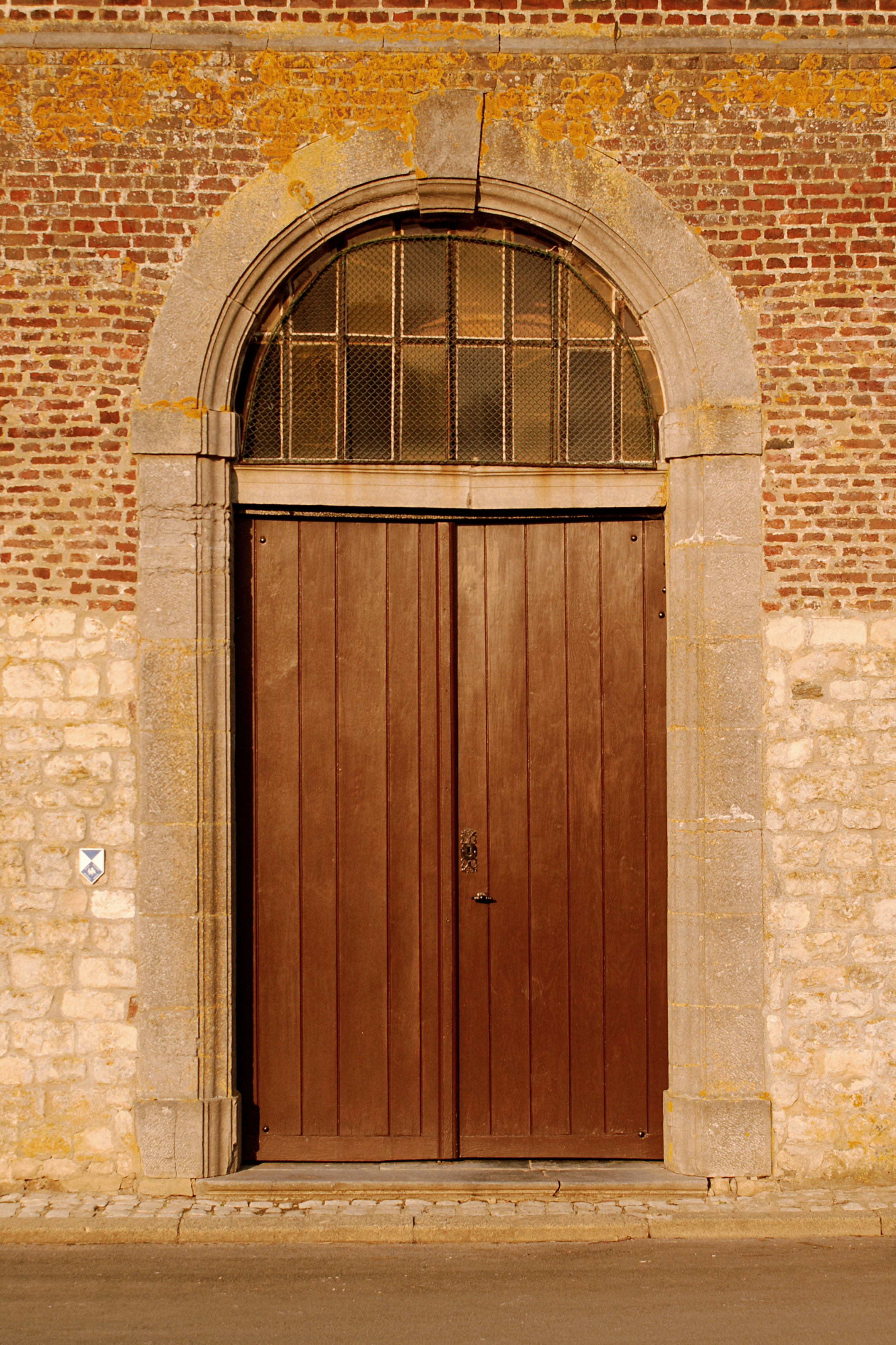 Belgique - Brabant wallon - Église Saint-Martin de Ways